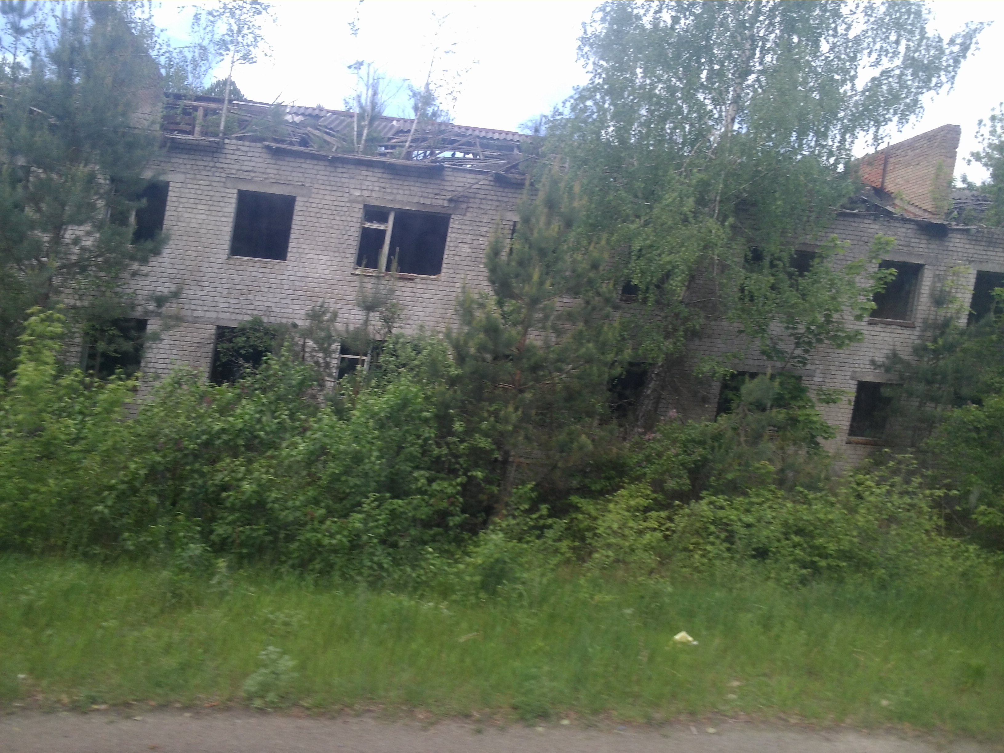 смт Поліське